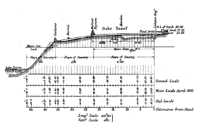 Spojení Nilu s jezerem Qarun (Meoris) v oáze Fájum, Egypt